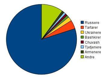 Oversigt over russisk demografi